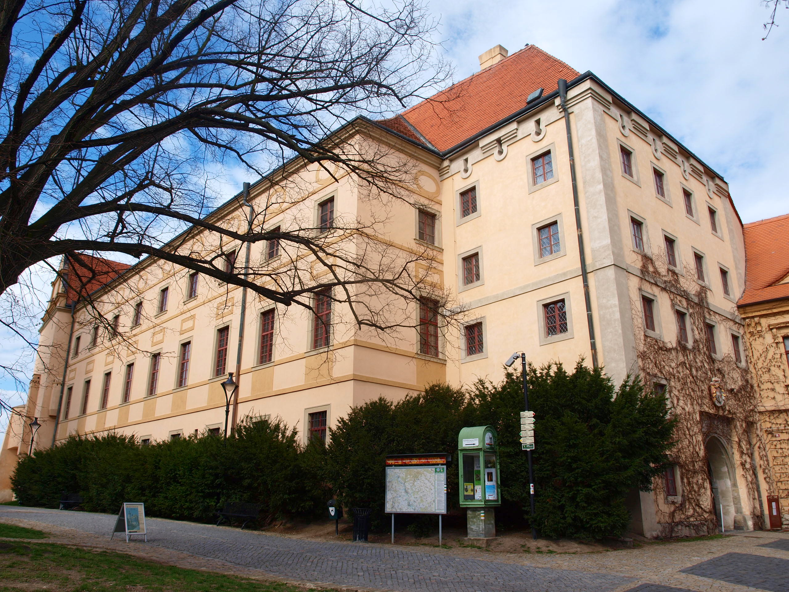 Mělník - zámek